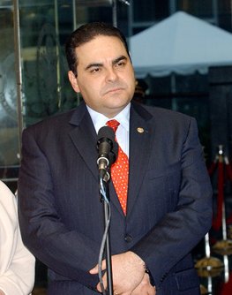 Elías Antonio ("Tony") Saca González, current (2007) President of El Salvador.